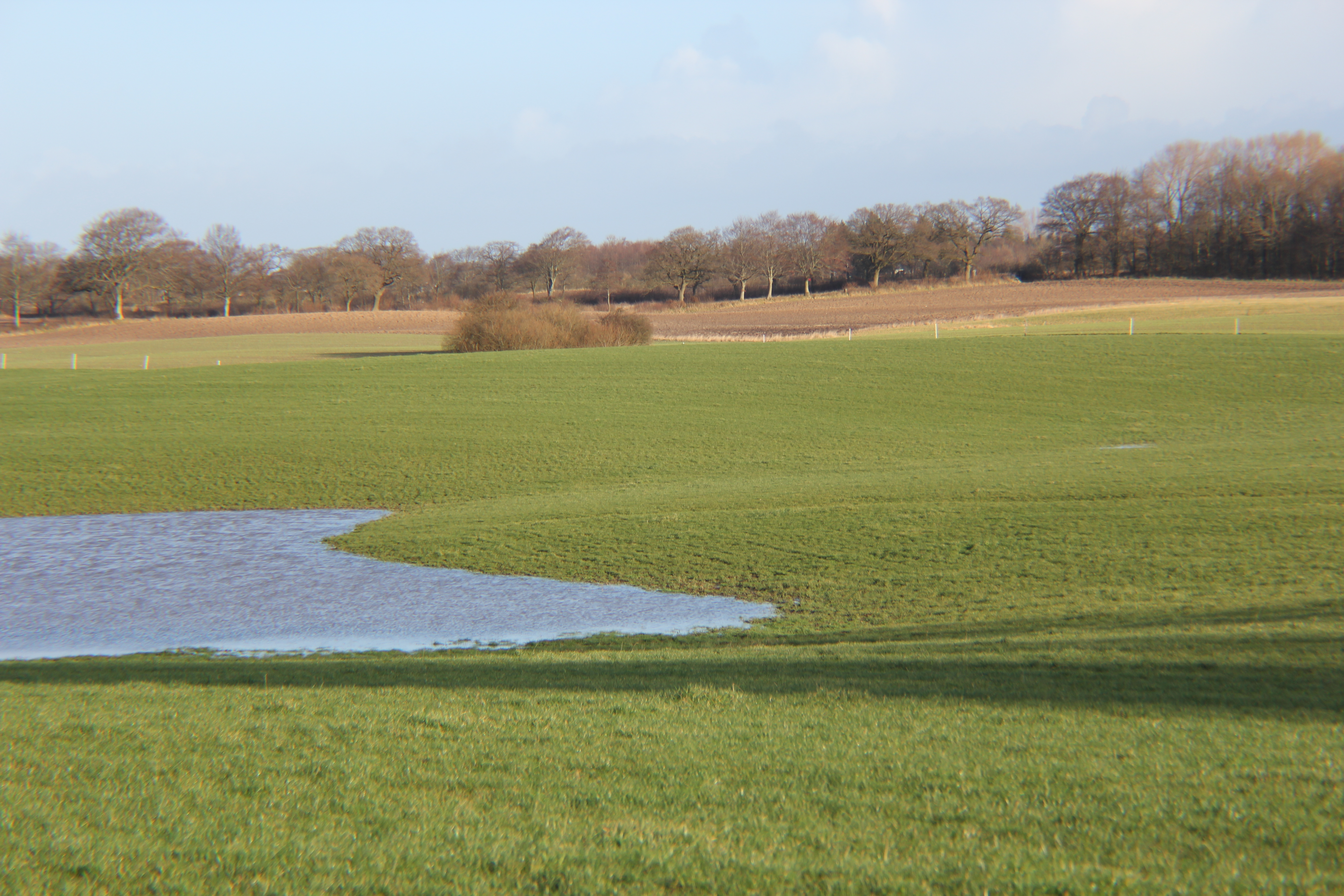 Gebiet Vogelsang (Flensburg), beim Vogelsang Feldweg; am Rande von Twedt (ziemlich unmittelbar, ungefähr dortː 54.793614, 9.485901)